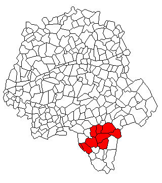 Le Canton du Gd Pressigny en Indre et Loire